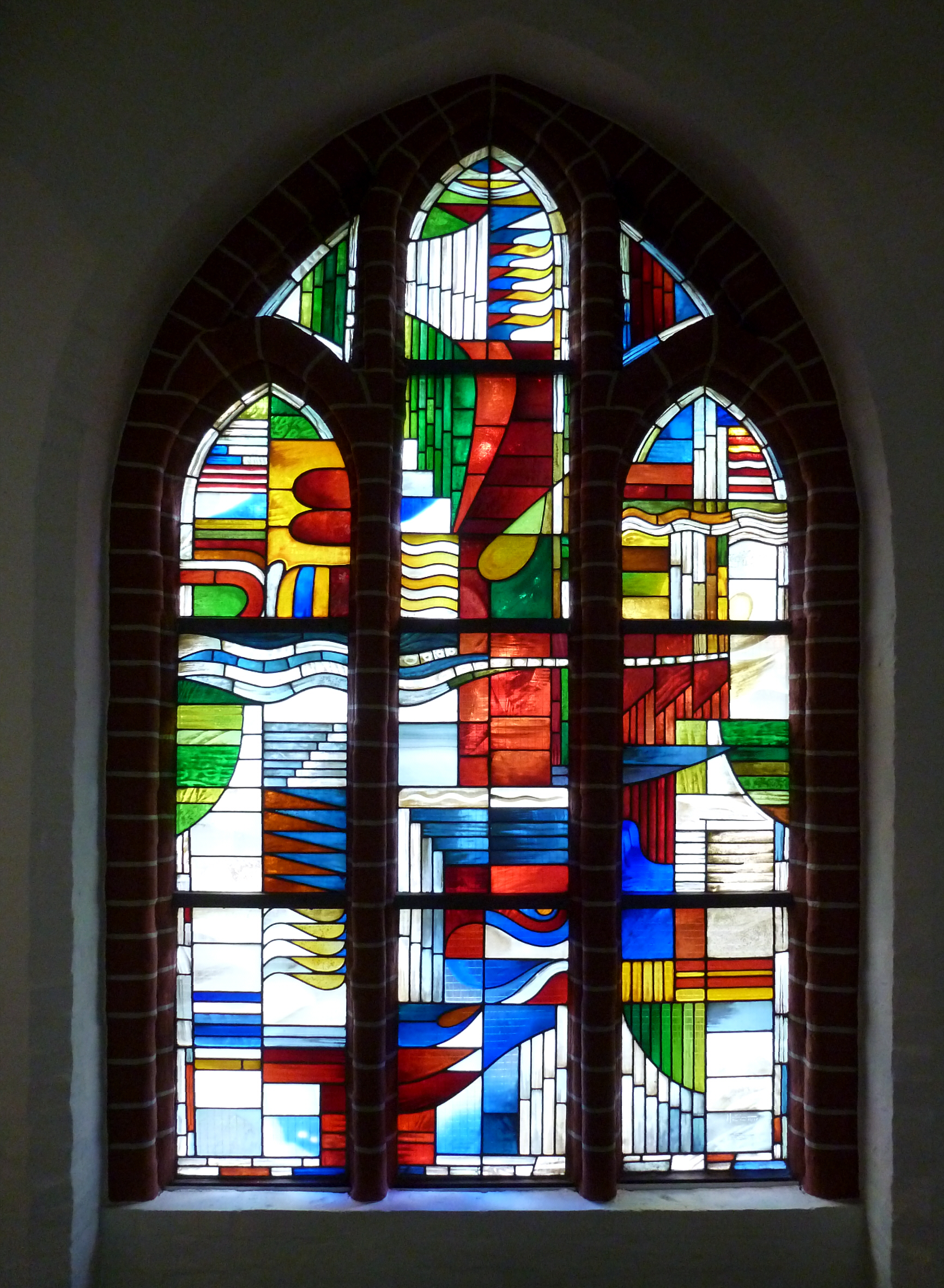 Kirchenfenster LOBGESANG nach dem Psalm 145 in der St. Johanniskirche zu Lüneburg, Niedersachsen. Gestaltet von dem Maler und Grafiker Gerhard Hausmann.